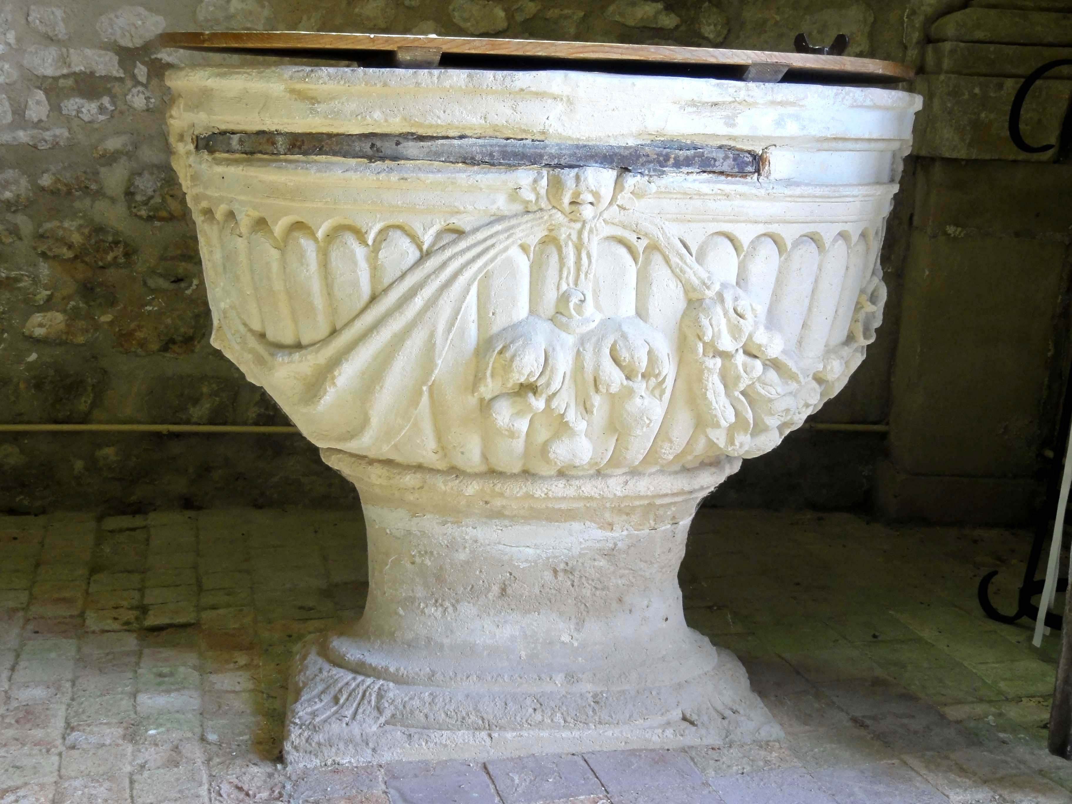 Mobilier de l'église Saint-Denis de Berville (voir titre).